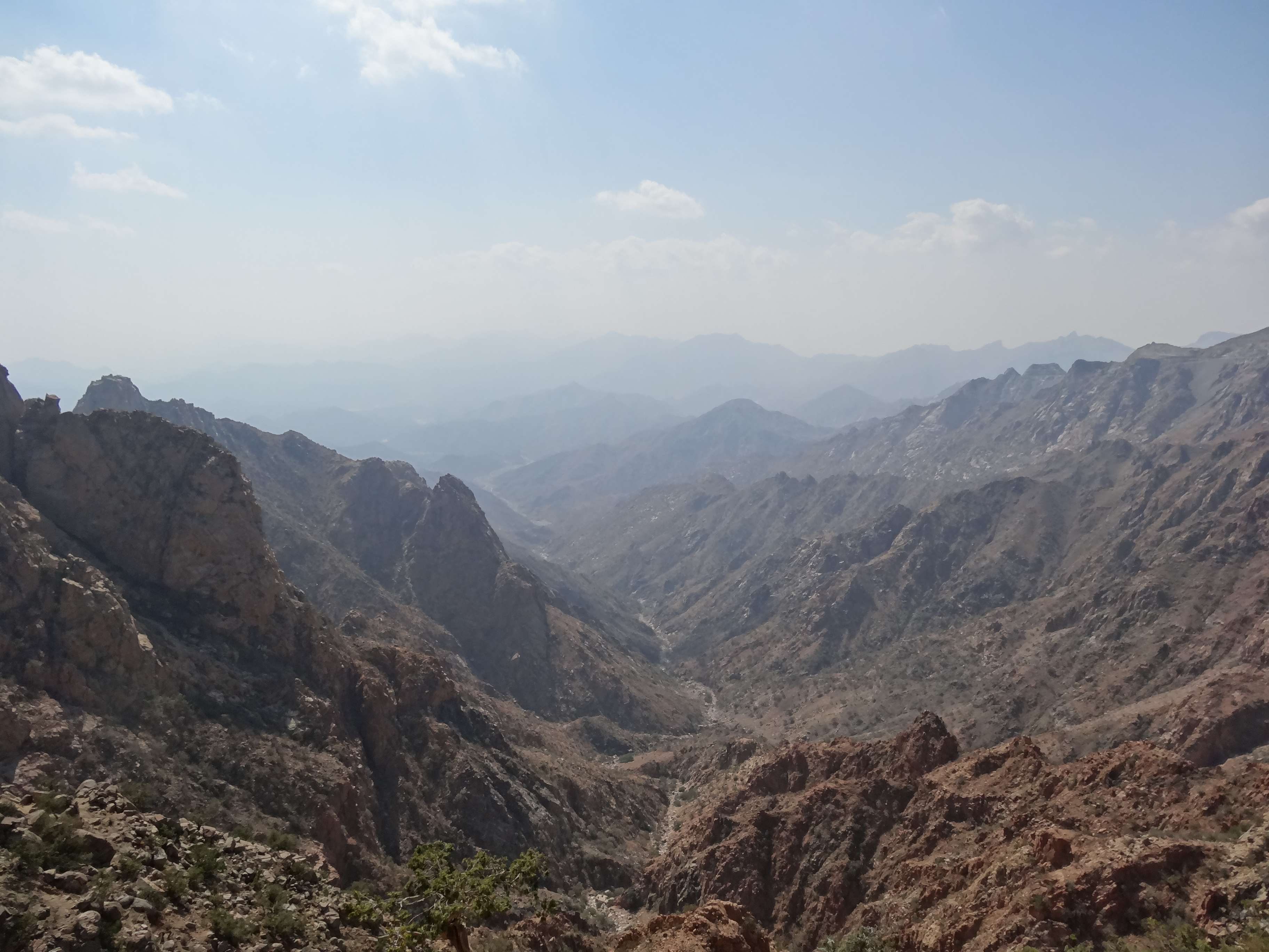 Saudi Mountain View